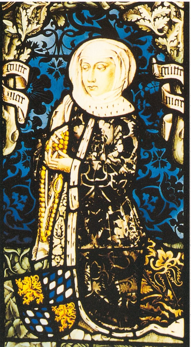 Mechthild von der Pfalz (1419–1482), Glasbild in der Stiftskirche Tübingen